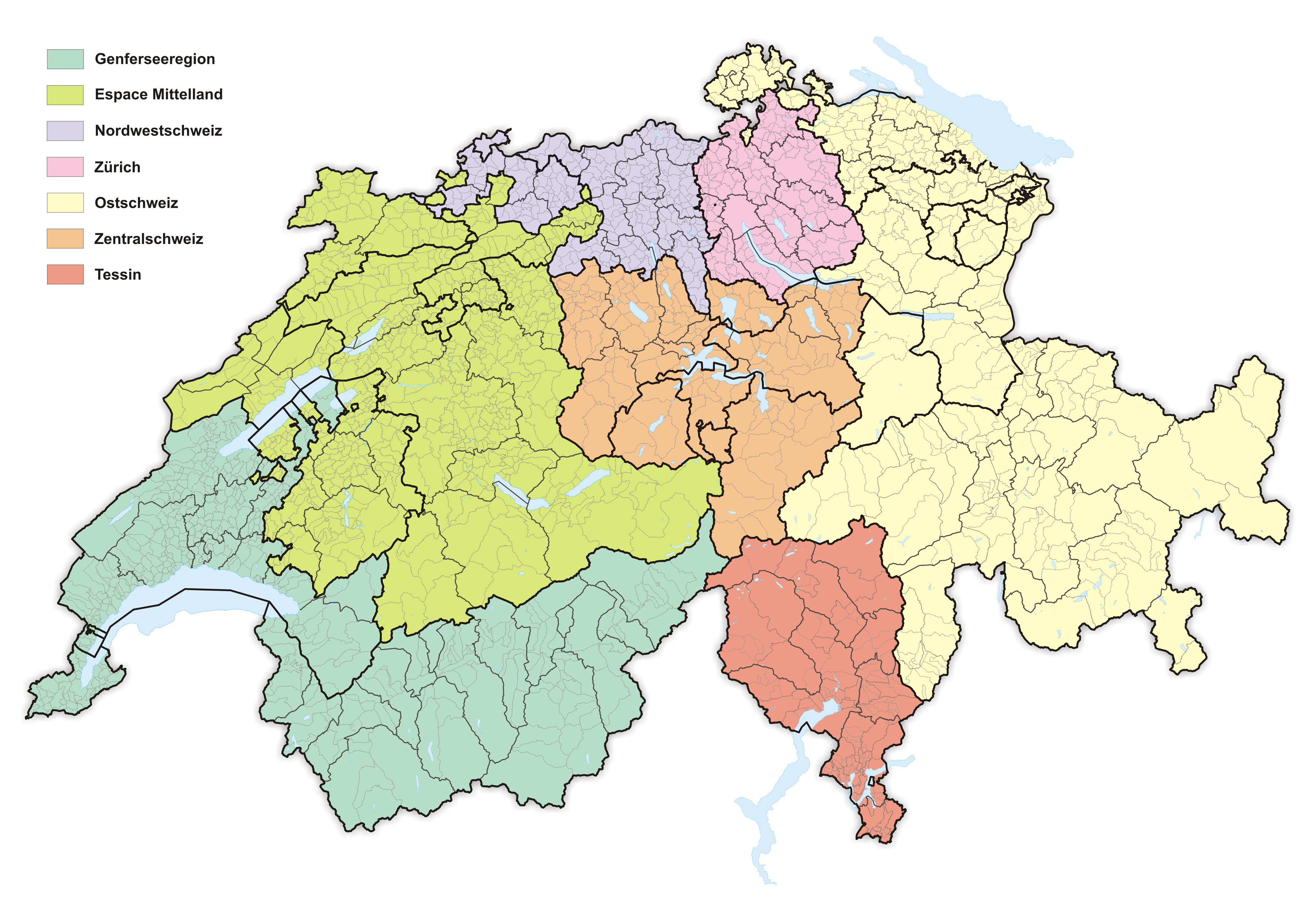 Grossregionen der Schweiz